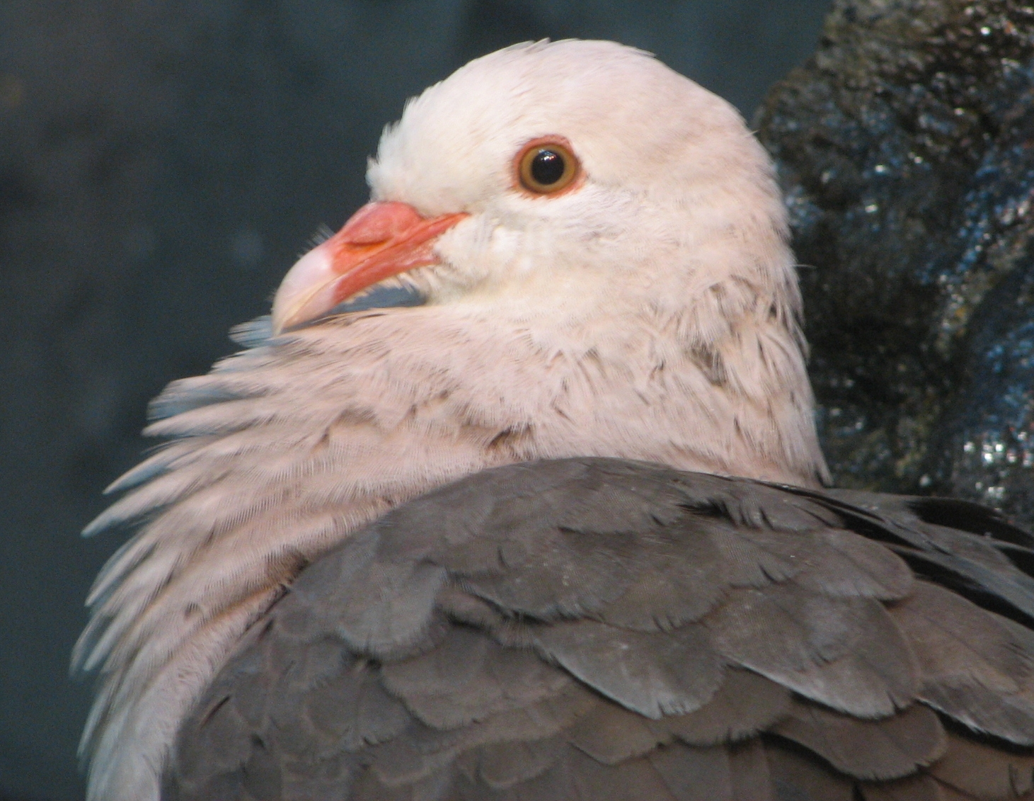 Mauritius Pink Pigeon - Columba mayeri